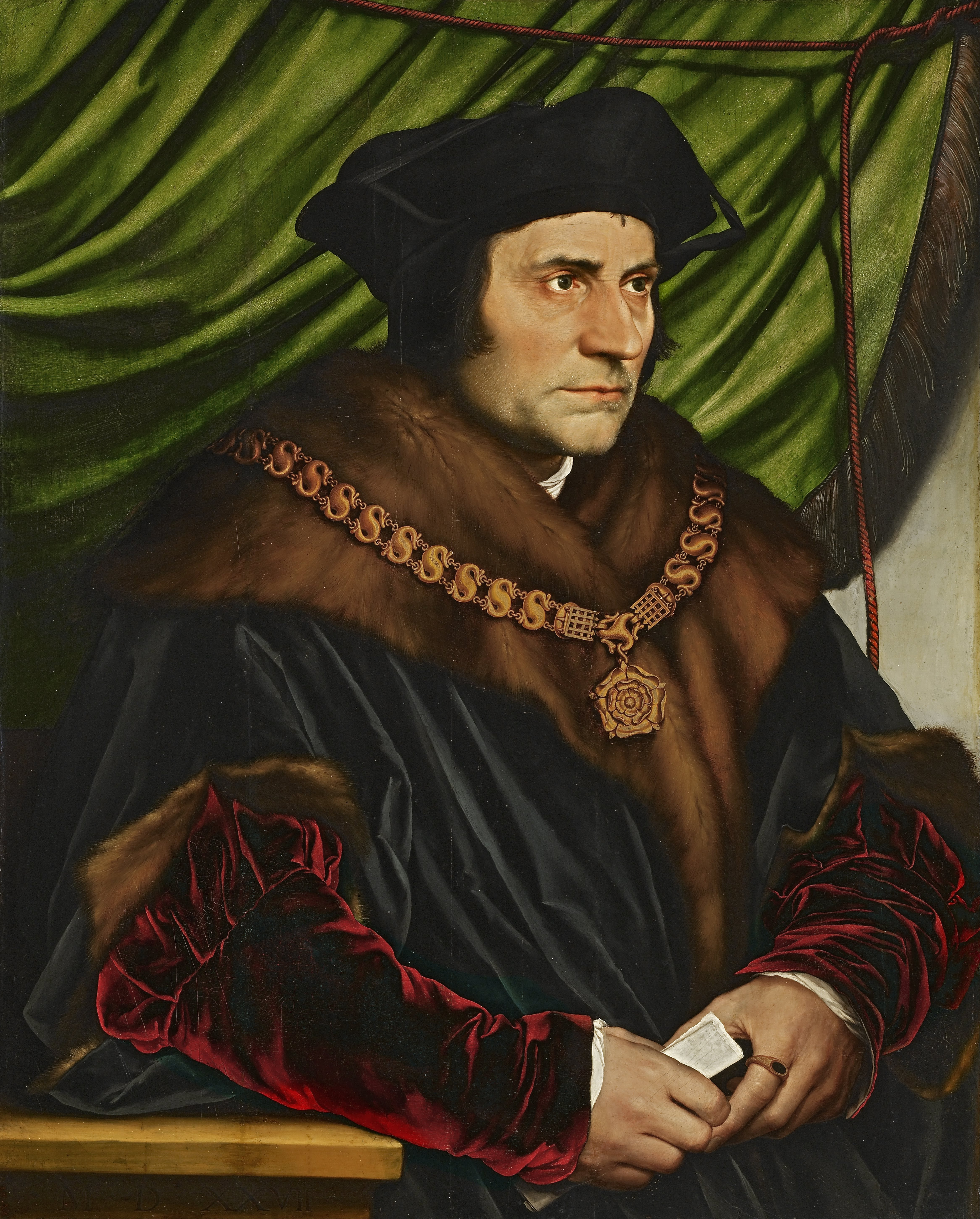 İngiliz devlet adamı, yazar ve hukukçu Thomas More'un (1478-1535); Alman ressam Hans Holbein tarafından 1527 yılında, 74,2 cm x 59 cm (29,2 in x 23 in) ölçülerinde yapılan yağlı boya portesi.